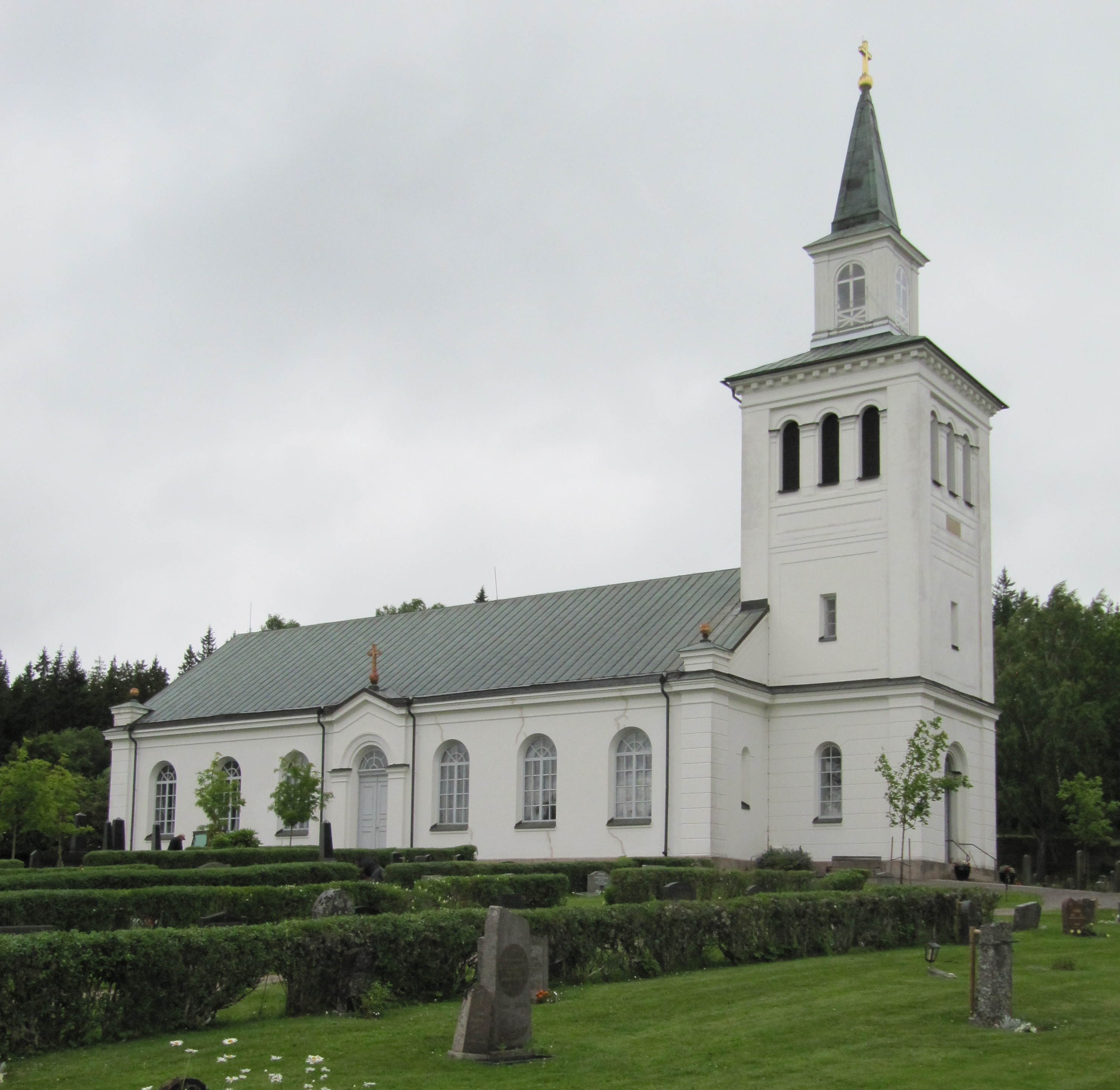 Lönneberga kyrka från sydost